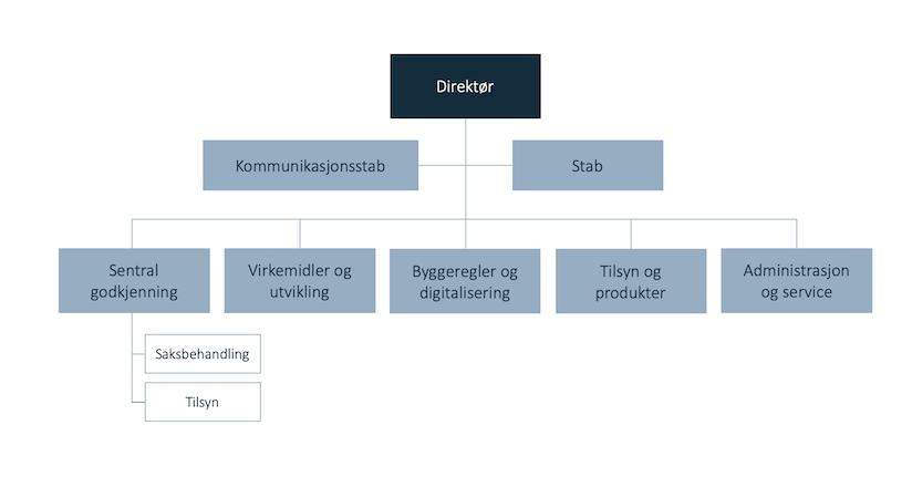 Organisasjonskart for Direktoratet for byggkvalitet, 2020